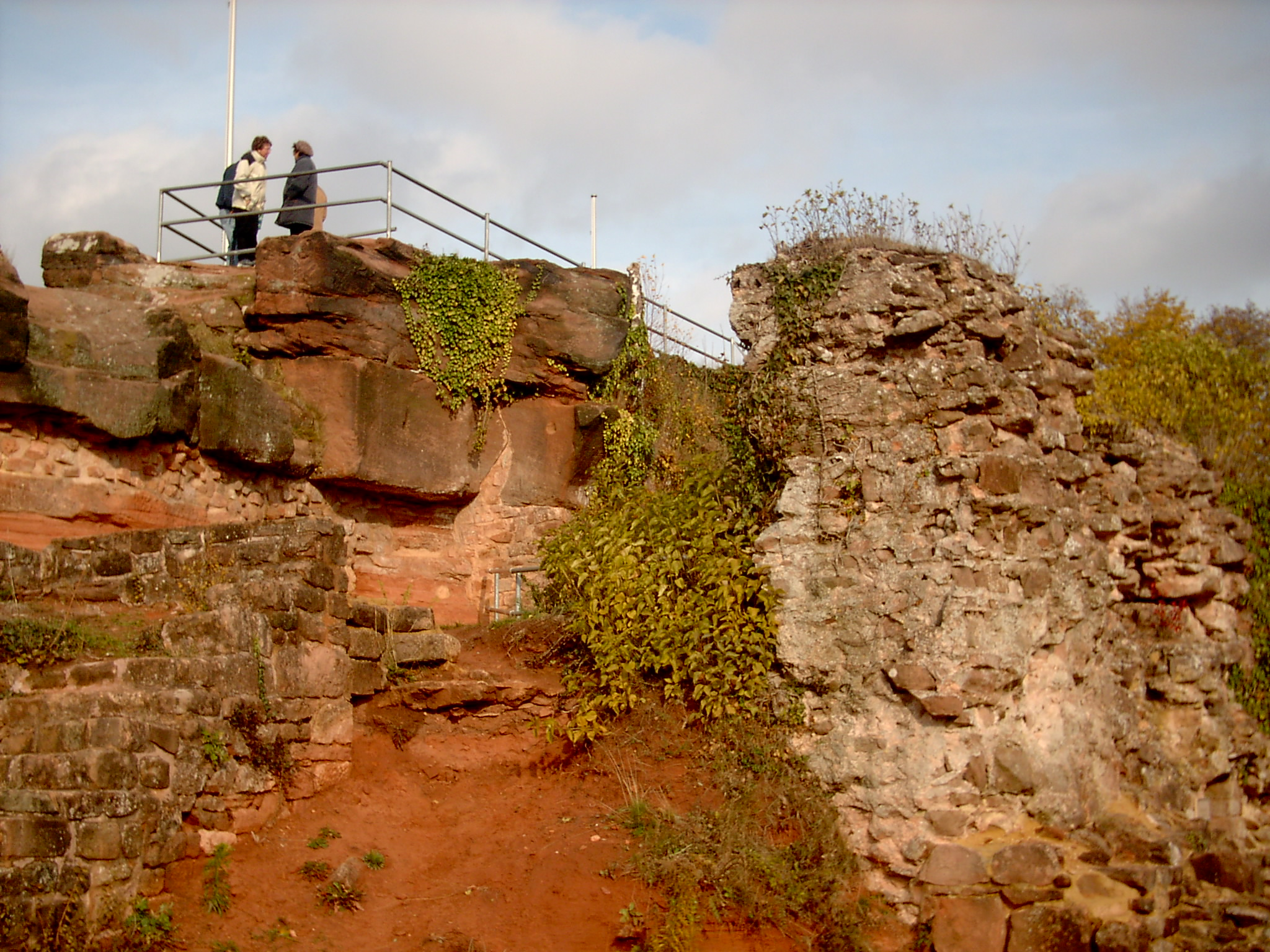 Ruine Festung Hohenburg in Homburg/Saar